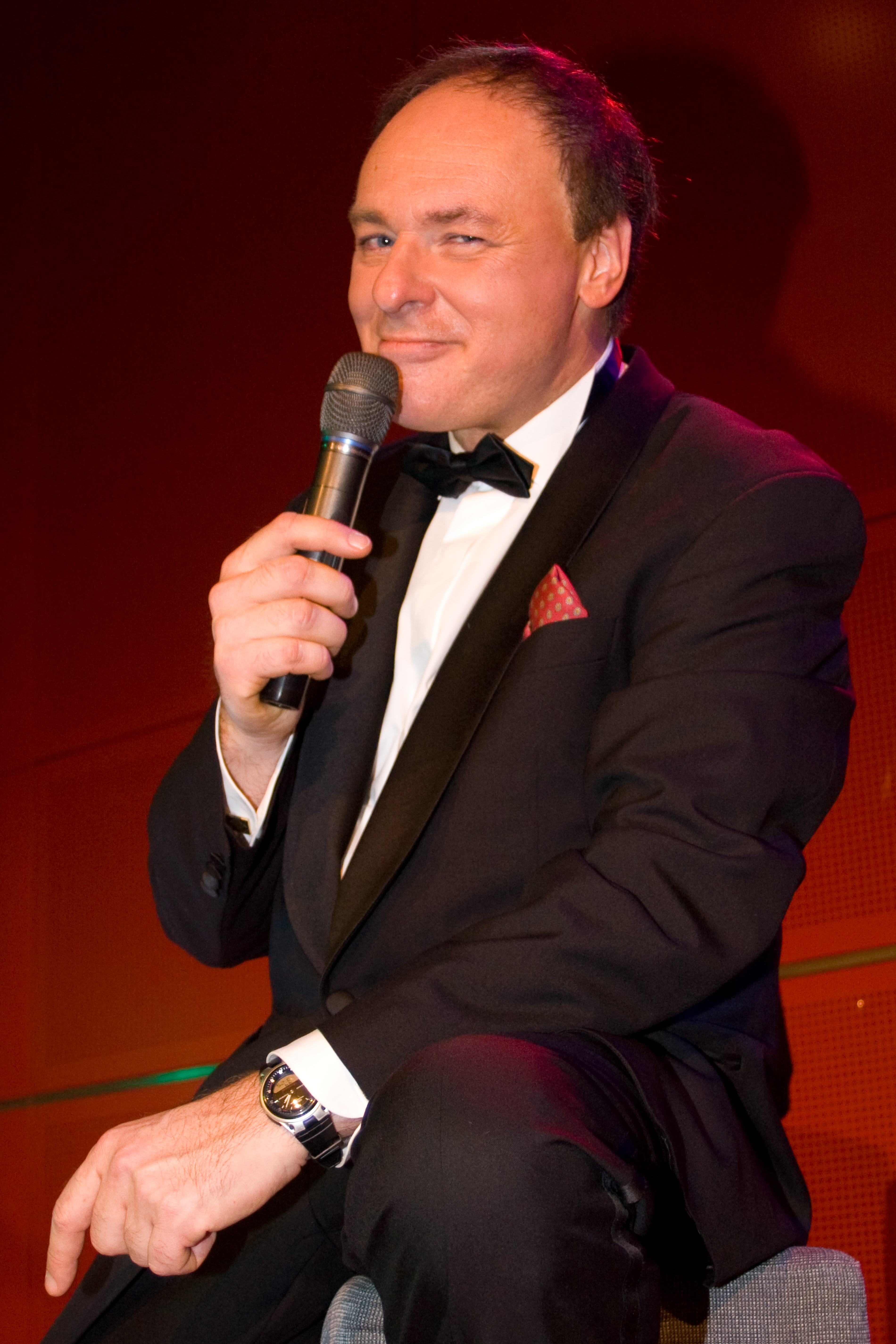 Elmar Bartel